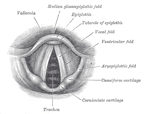 pjeset e kordave vokale